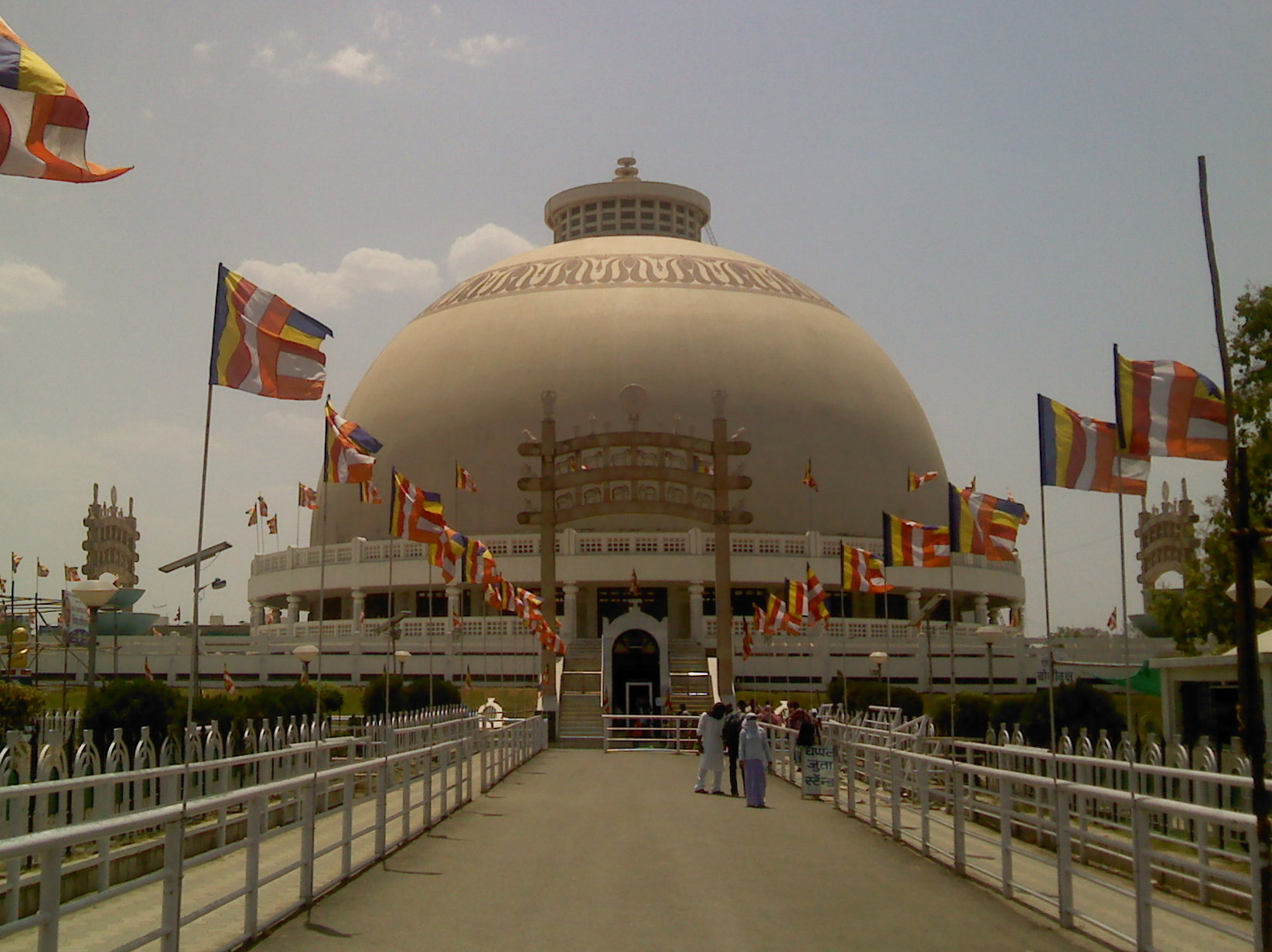 Deekshabhoomi